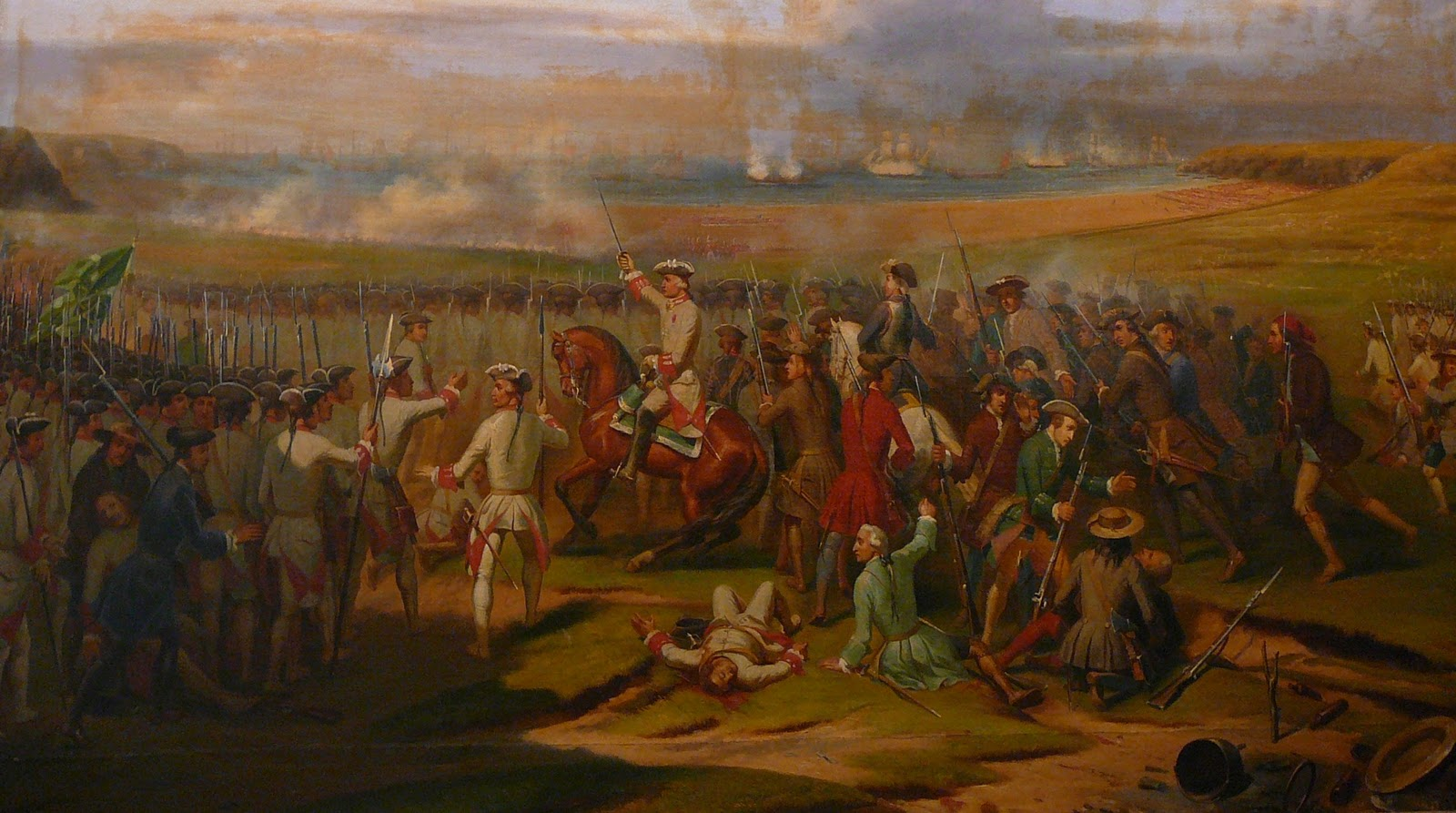 La bataille de Saint-Cast, livrée le 11 septembre 1758. Huile sur toile d'Artus Despagne, exposée à la préfecture des Côtes d'Armor.